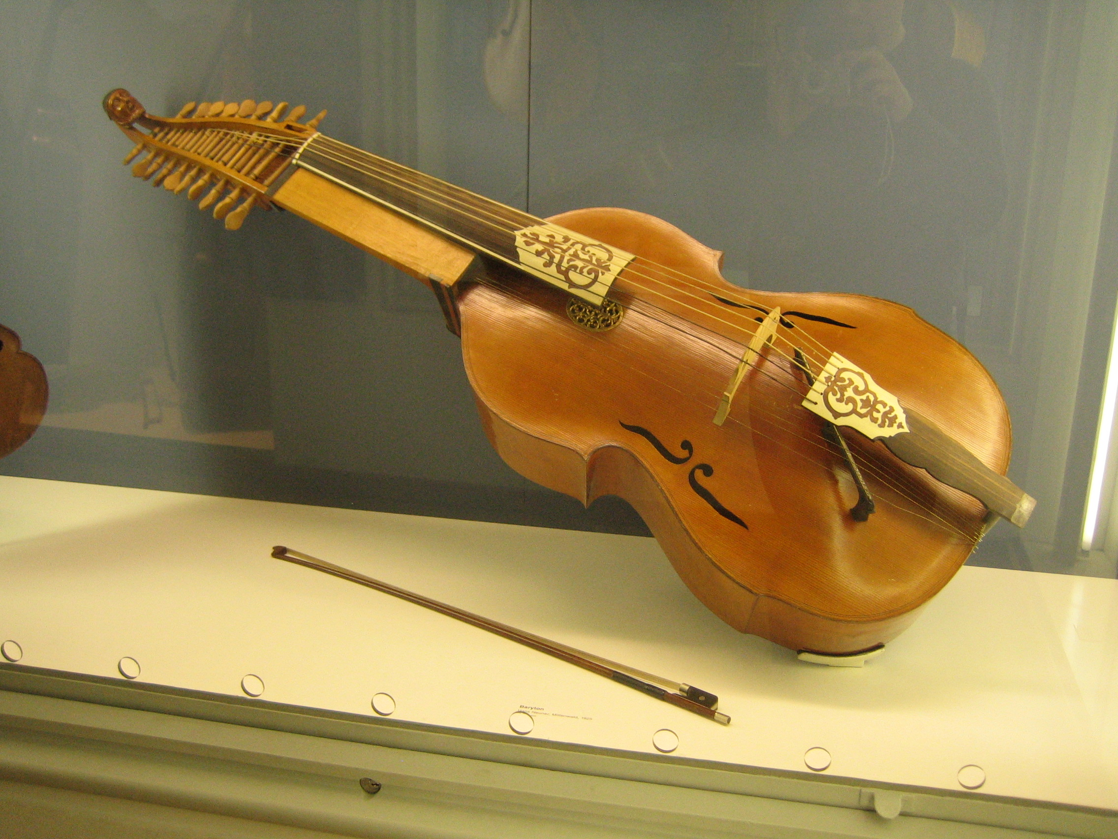 Baryton, Deutsches Museum Baryton ... ..., ..., 1925 ? Inv.-Nr. ...